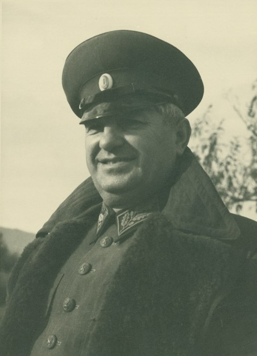 Помощник-главнокамандващият на армията генерал Фердинанд Козовски.